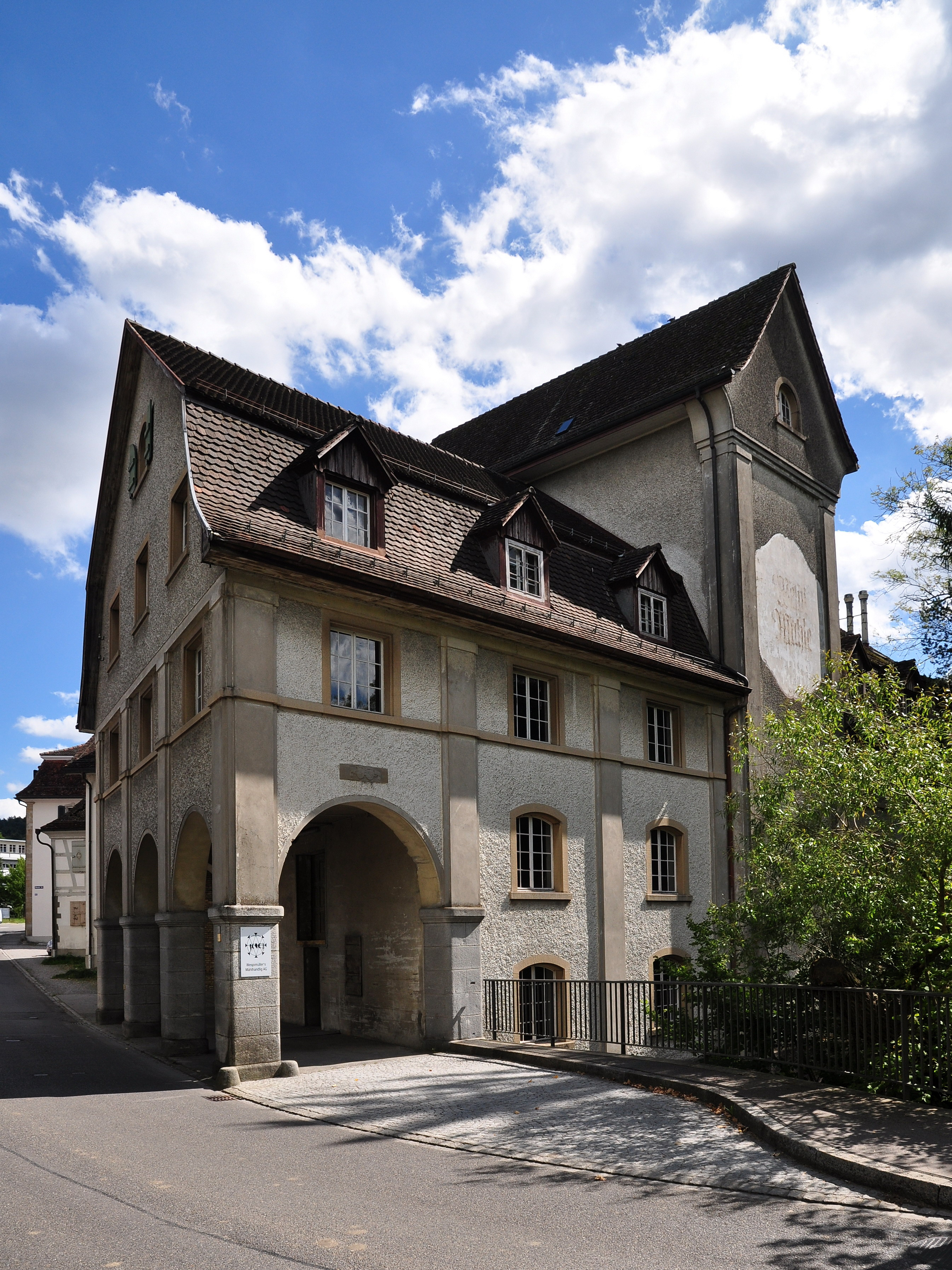 Wespi-Mühle, Wieshofstrasse 105 in Winterthur (Switzerland)